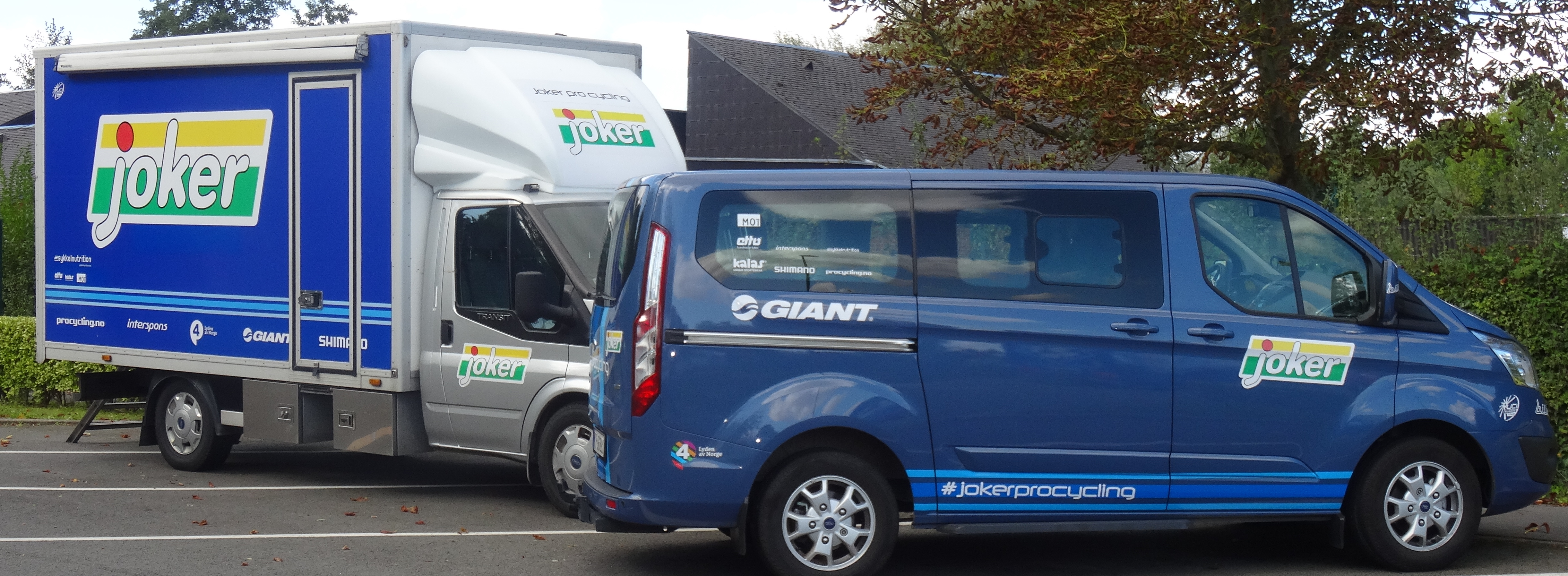 Reportage réalisé le dimanche 21 septembre à l'occasion du départ et de l'arrivée du Grand Prix d'Isbergues 2014 à Isbergues, Nord-Pas-de-Calais, France.